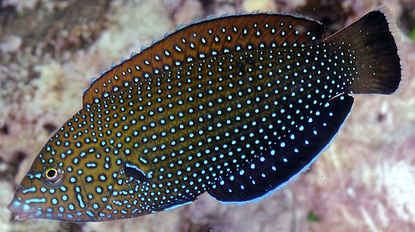 Un labre constellé (Anampses caeruleopunctatus) à la Réunion.